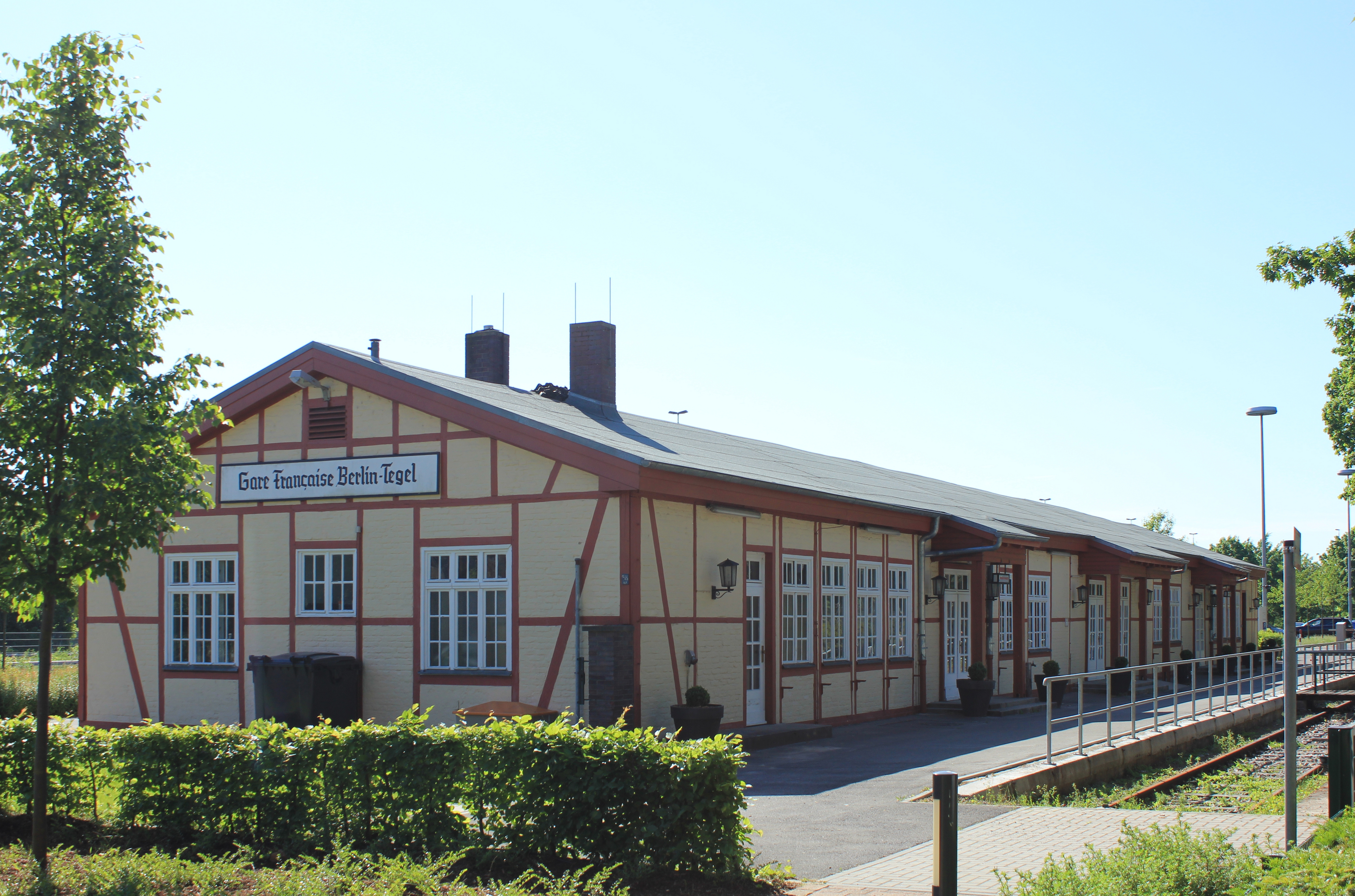 Ehem. Französischer Militärbahnhof Berlin-Tegel 1947